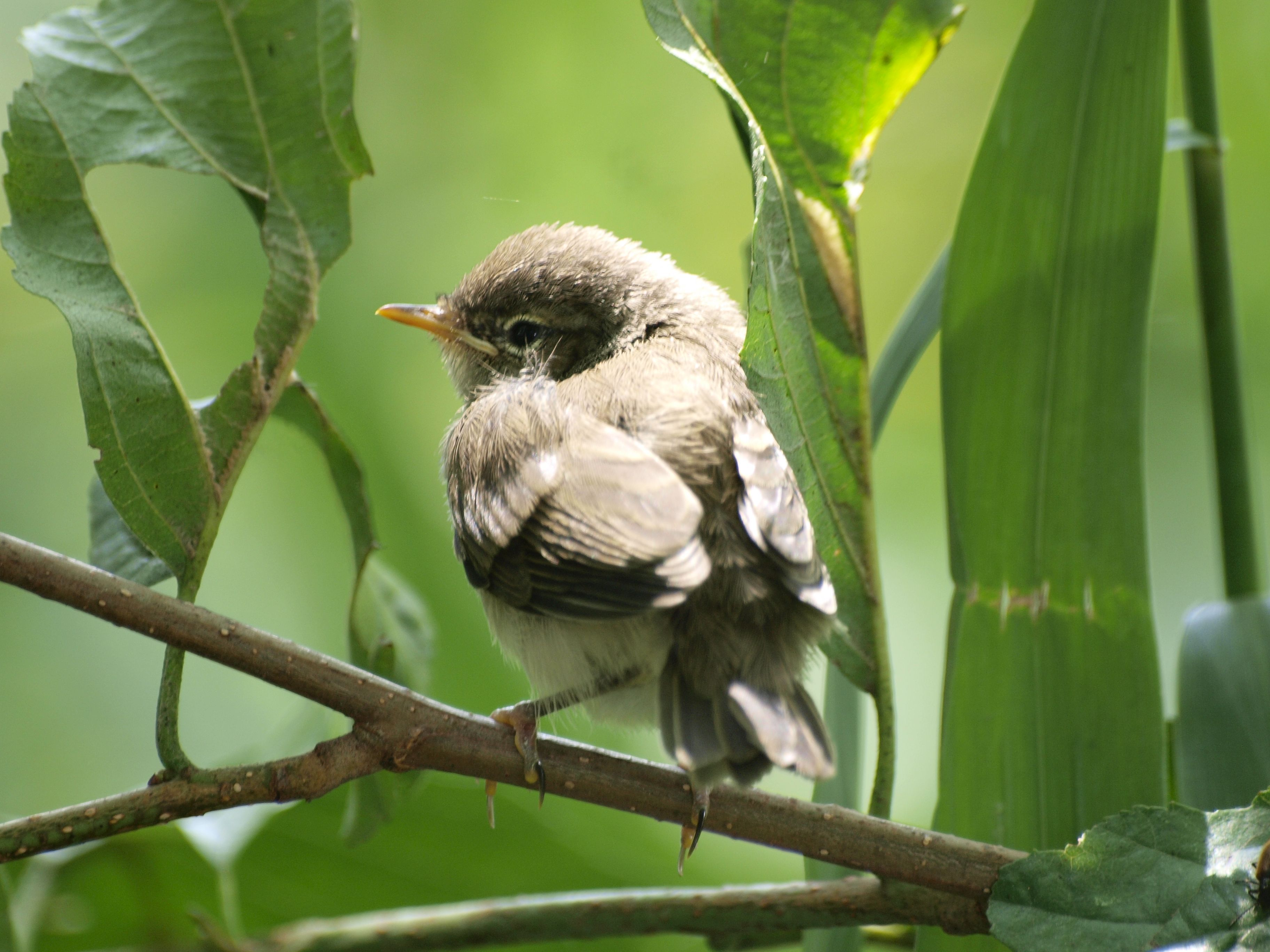 Gerade flügge gewordener Jungvogel, noch nicht ausgewachsen.